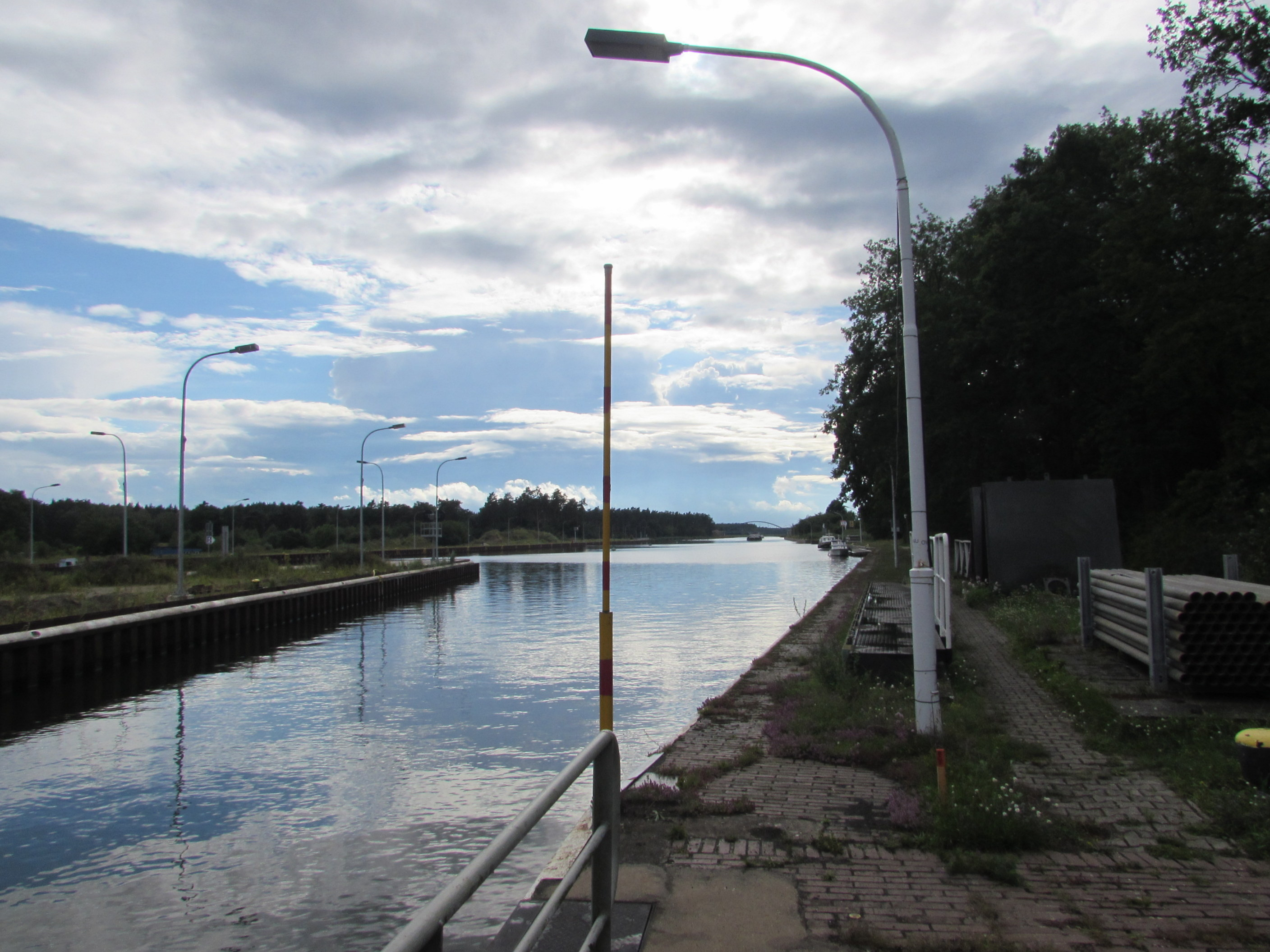 der elbe-havel-kanal bei woltersdorf, bensdorf